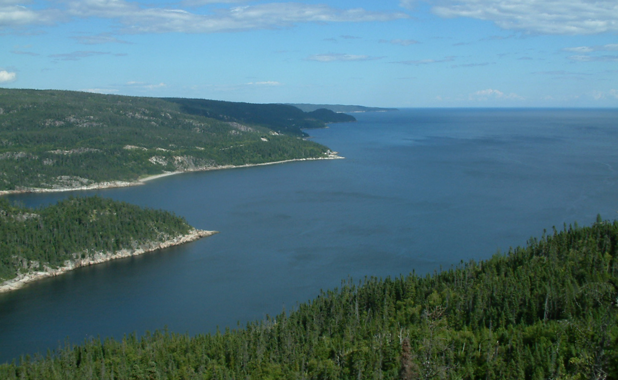 Baie St-Pancrace au nord de Baie-Comeau, Québec, Canada